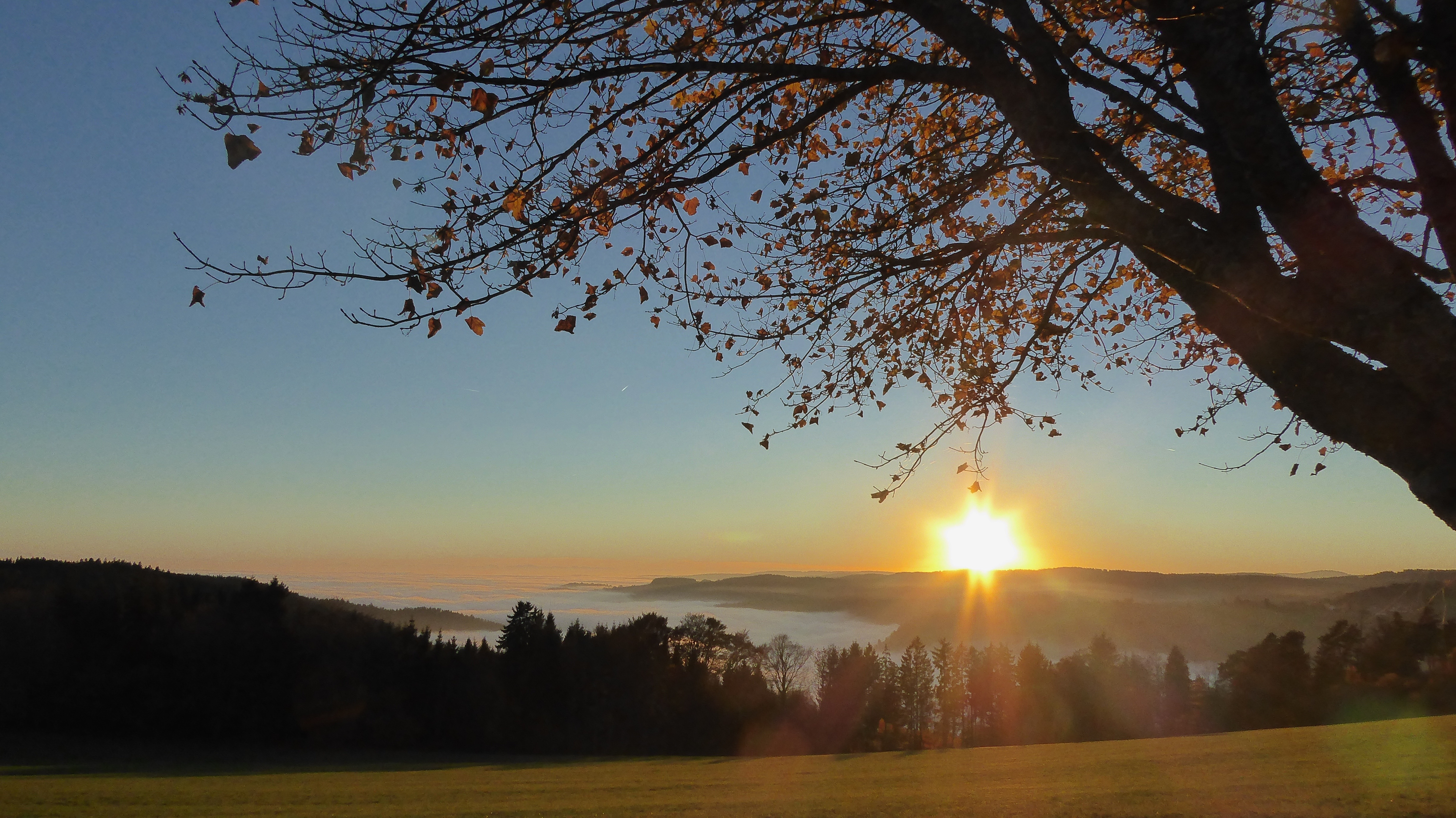 Nebel über dem Albtal